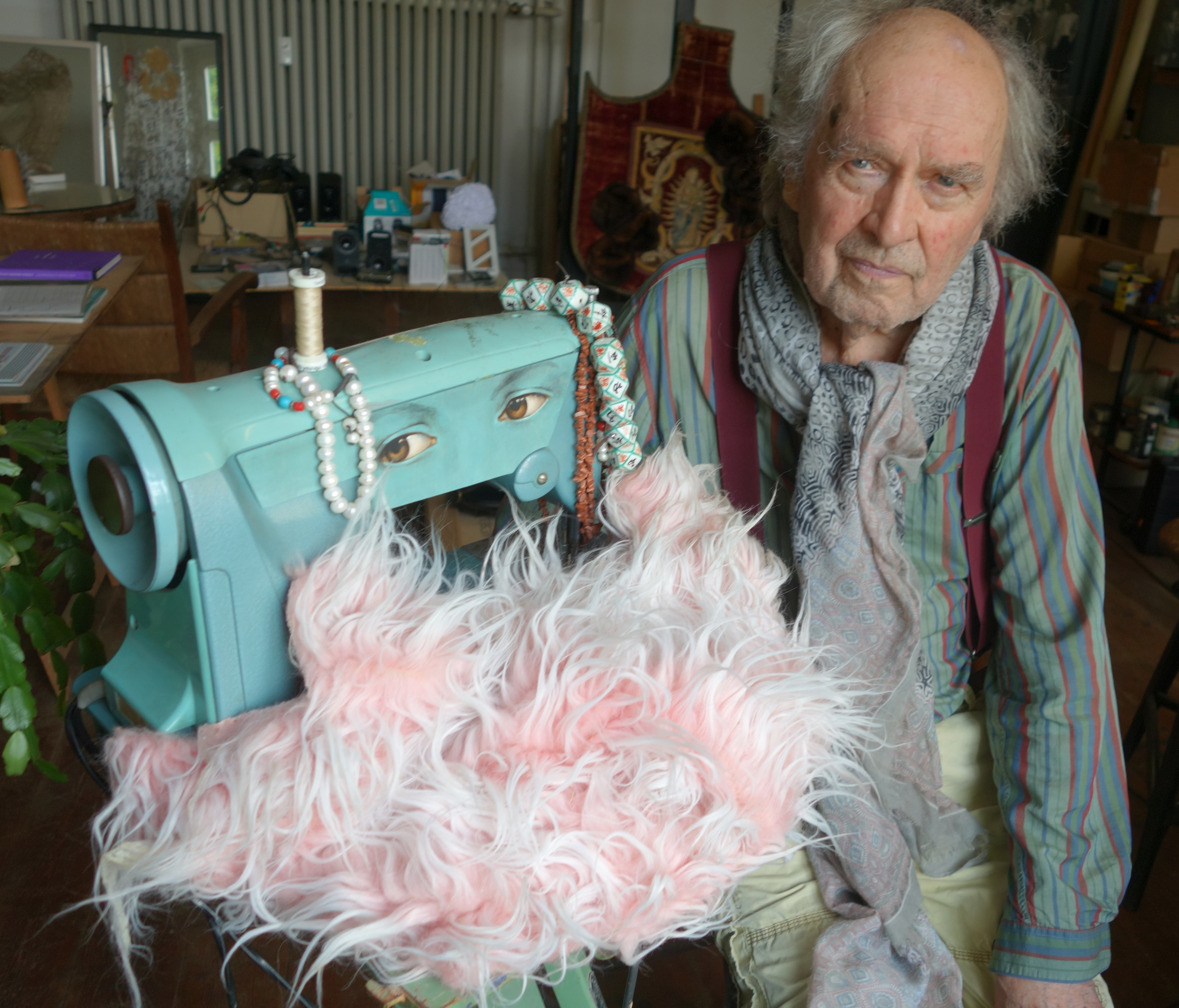 Besuch bei Günter Weseler im Atelierhaus, Düsseldorf-Niederlörick, September 2018. Günter Weseler und sein Objekt „ La Belle et la Bête“.